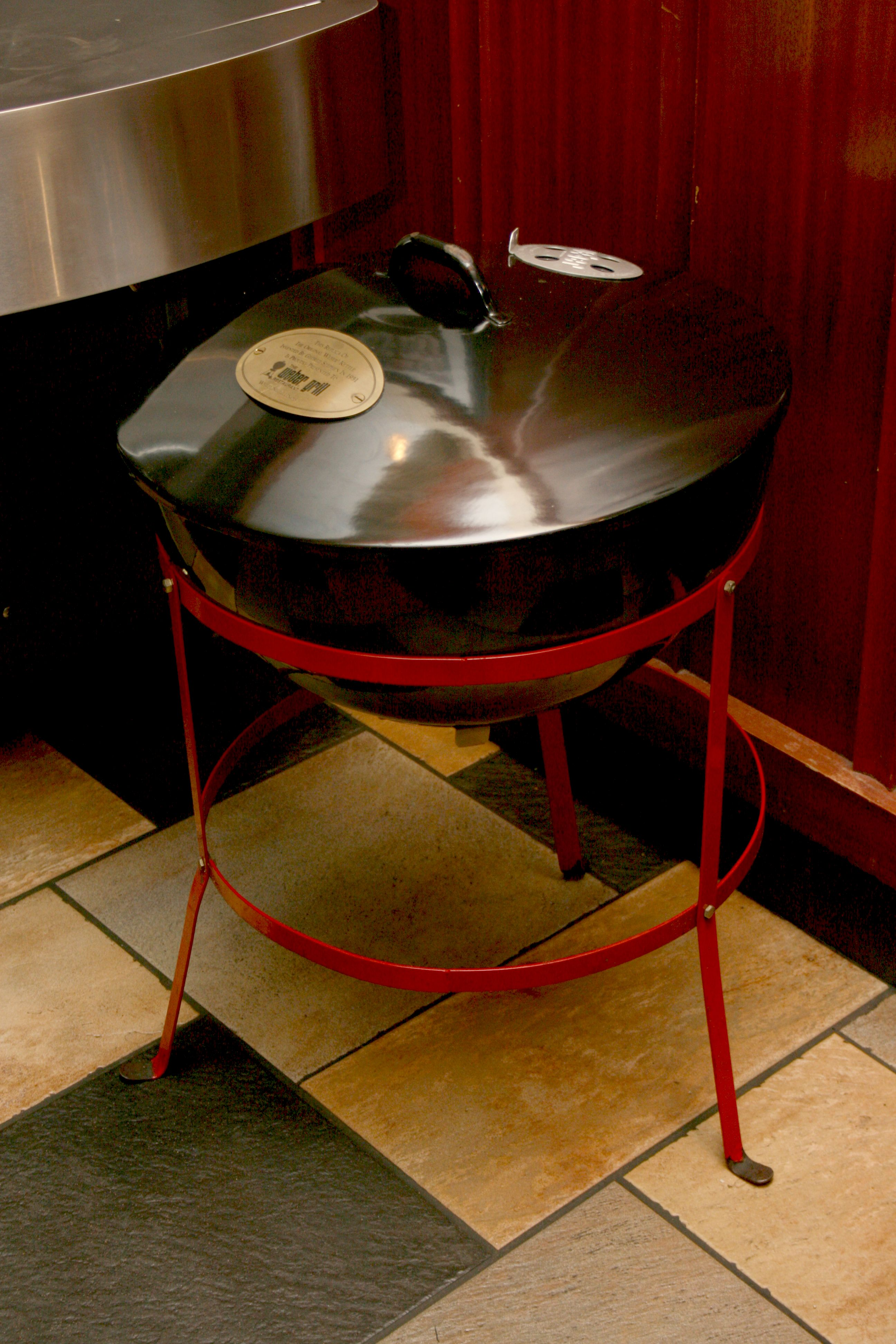 Weber 1951 Kettle Replica